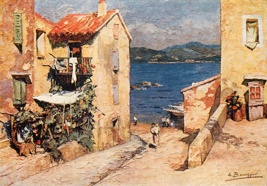 Petit port (Saint-Tropez), salon de 1938